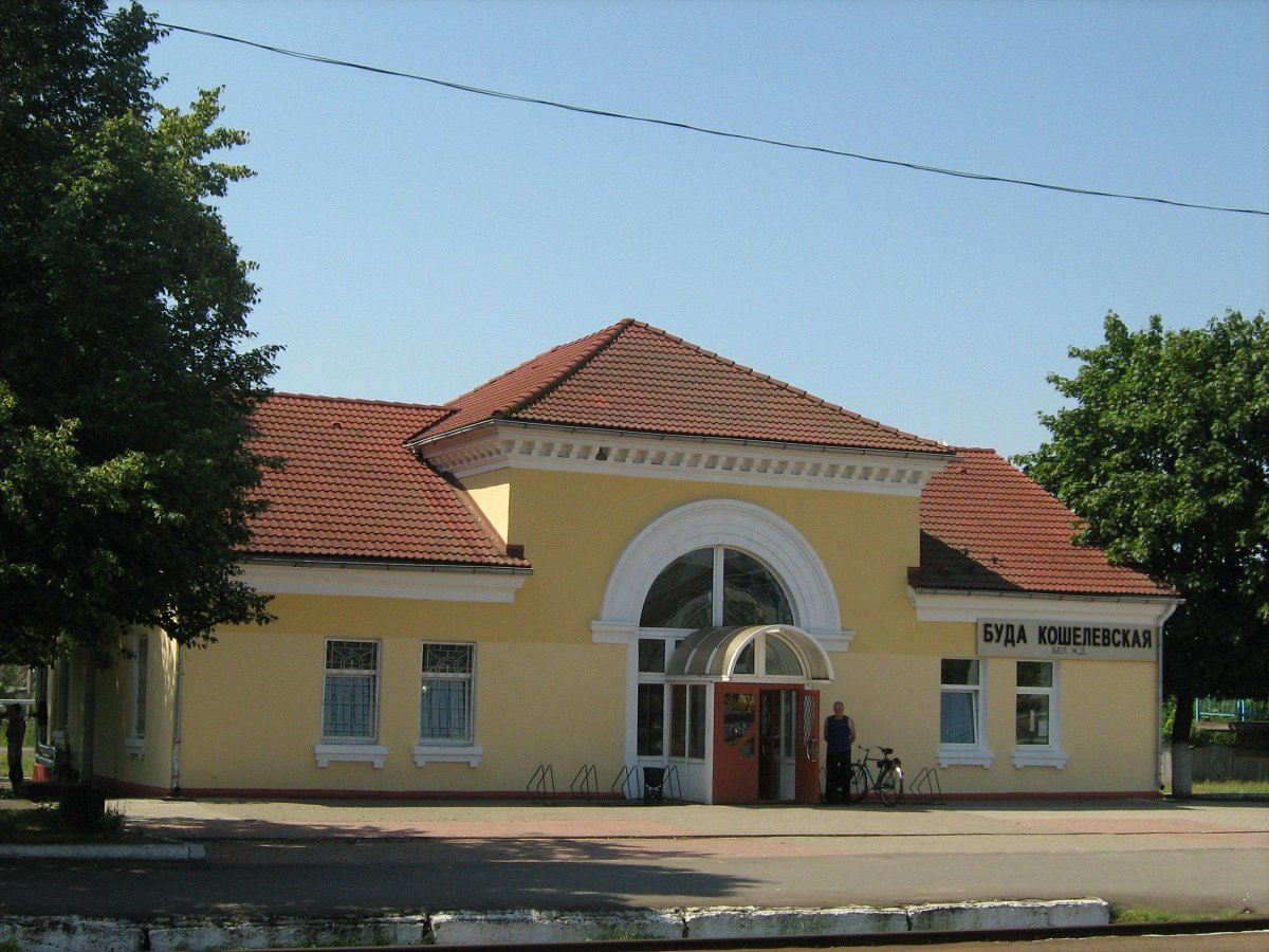 Буда-Кашалёва. Станцыя